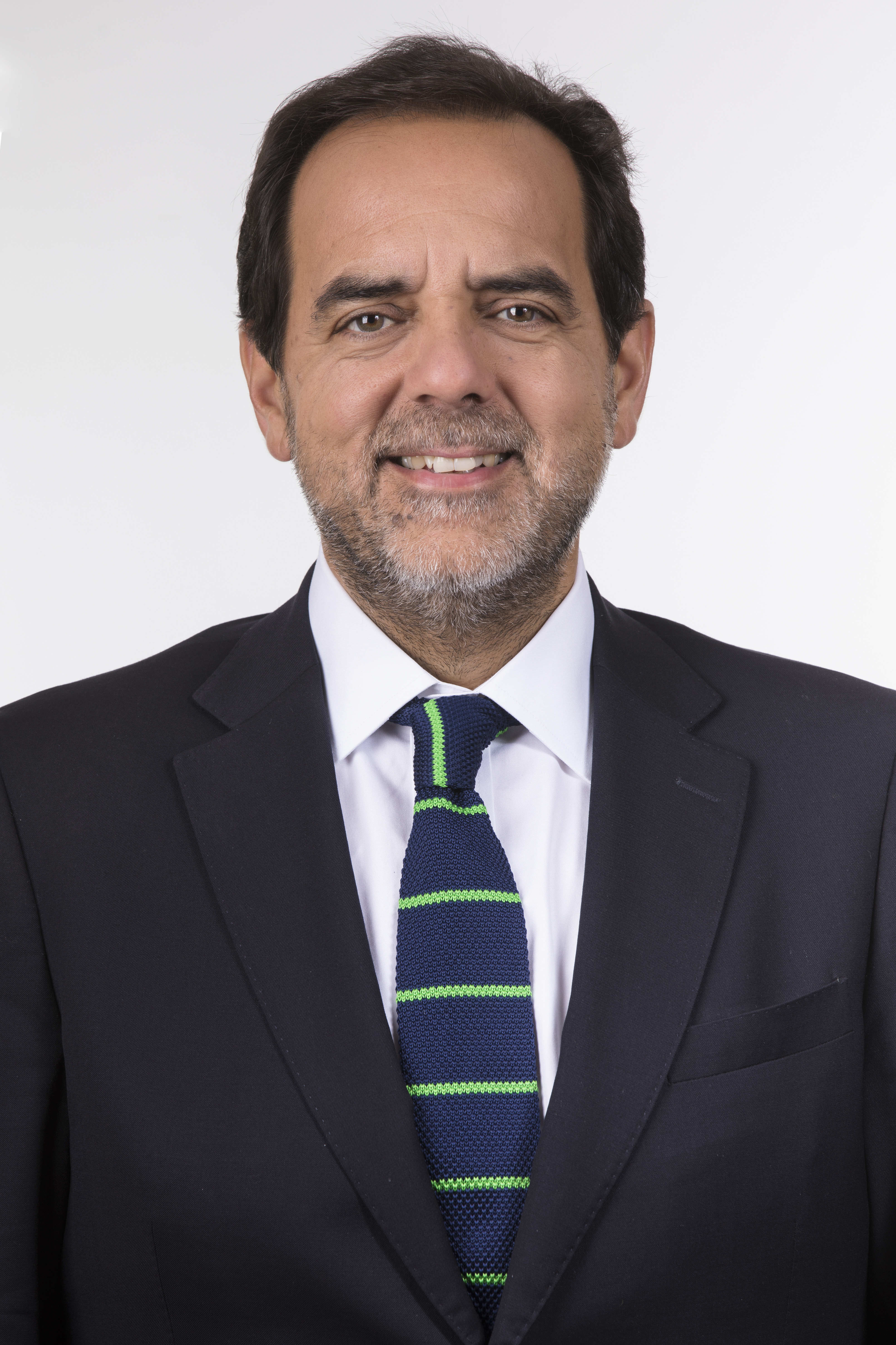 Jaime Mulet Martínez en la fotografía oficial de diputados periodo 2018-2022. (Fotos: Christel Andler, René Lescornez, Johanna Zárate)